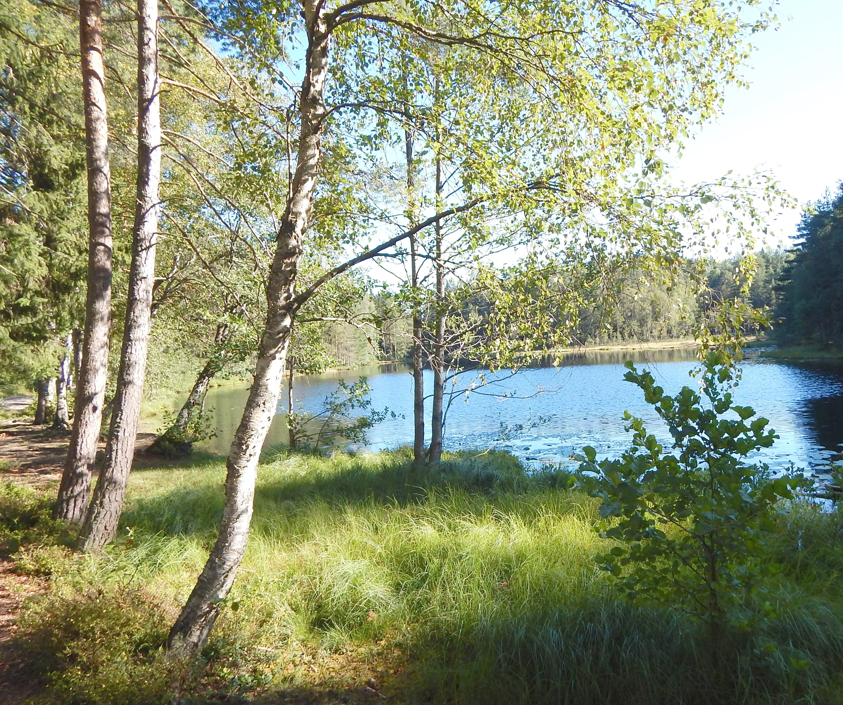 Rundtjern i Østmarka